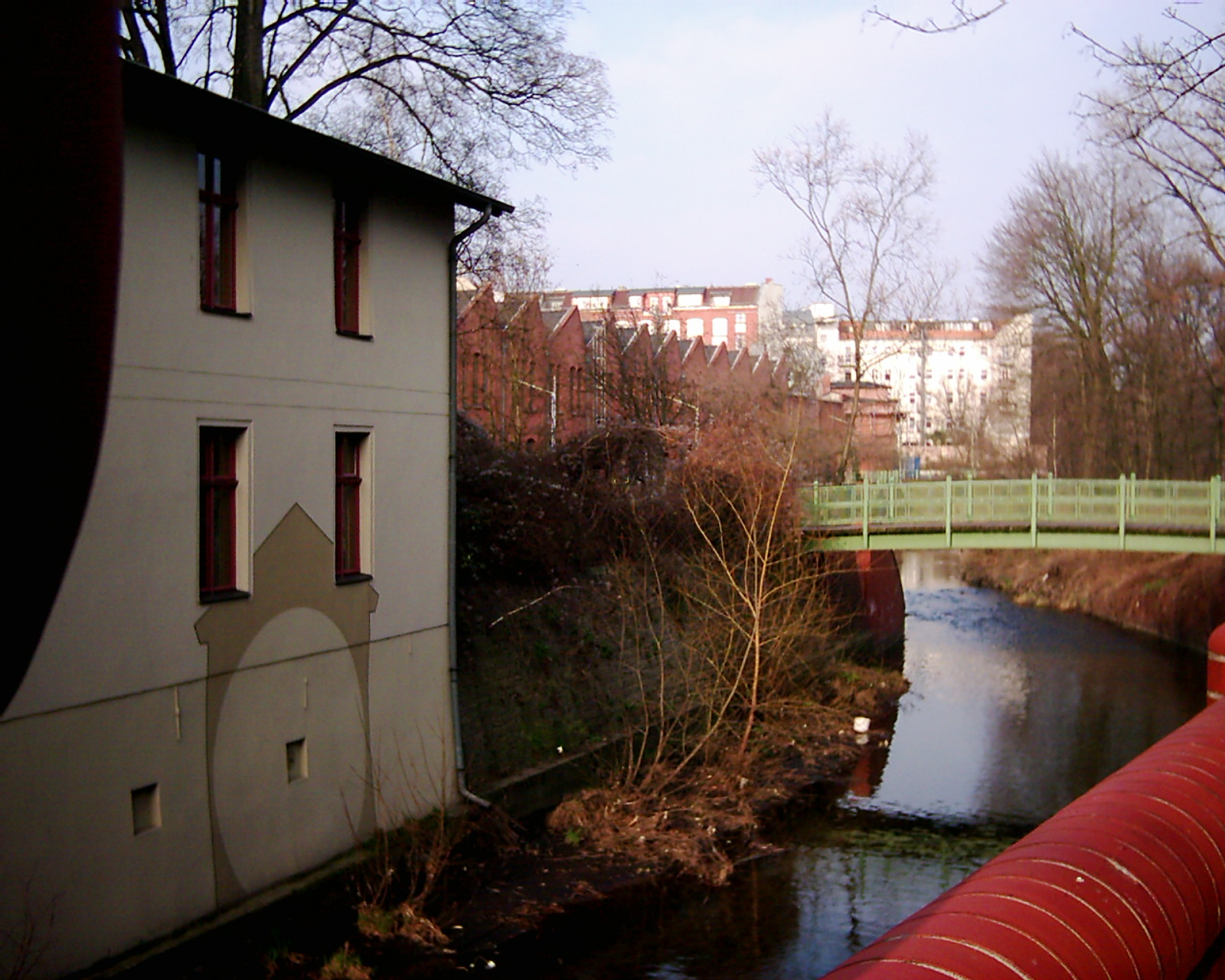 Einst trieb an der Badstraße die Panke eine Mühle